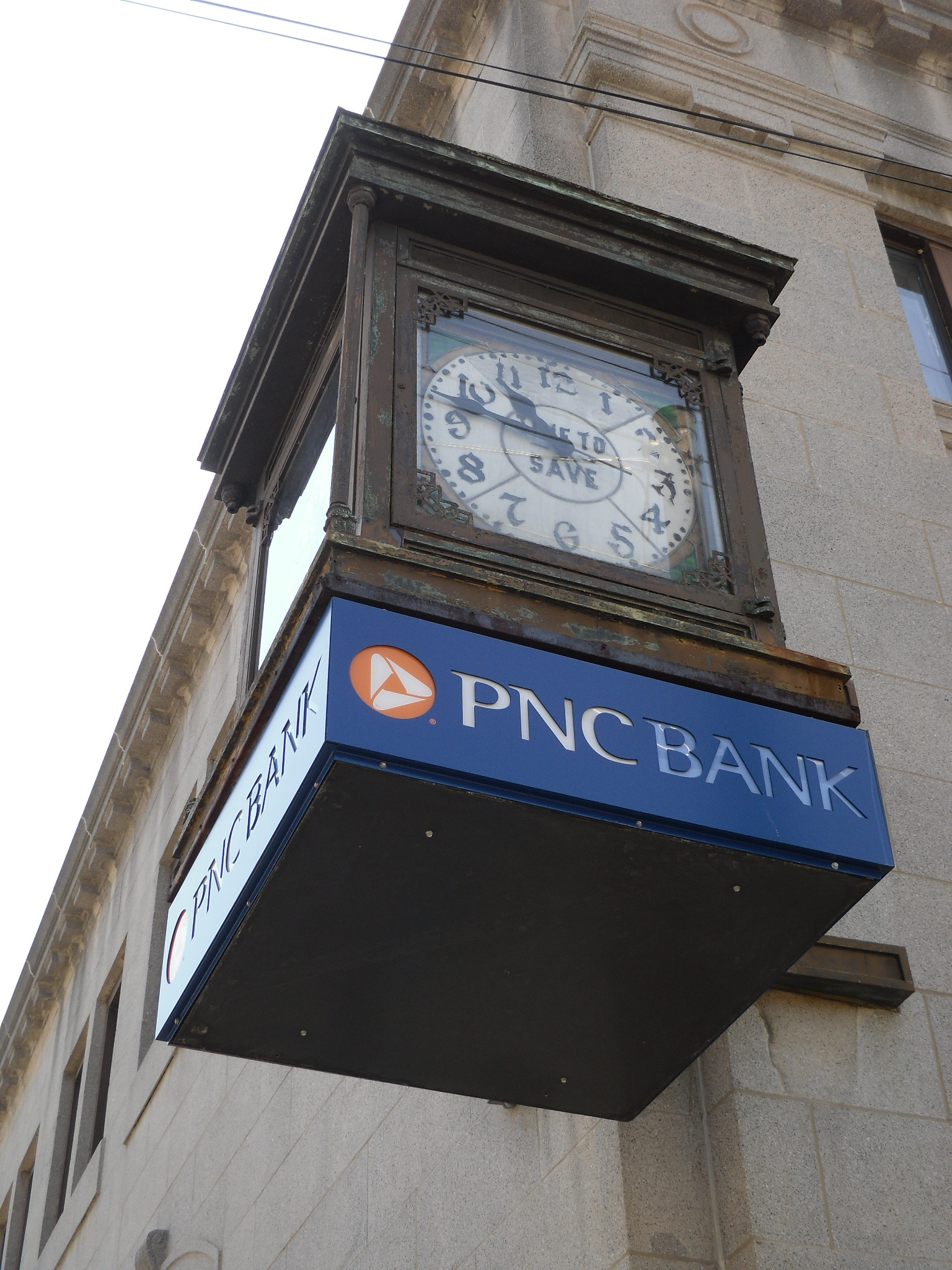 Freeport, Pennsylvania